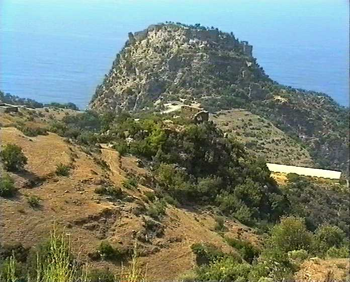 Burgberg mit Zitadelle von Antiochia ad Cragum westlich von Anamur an der türkischen Südküste